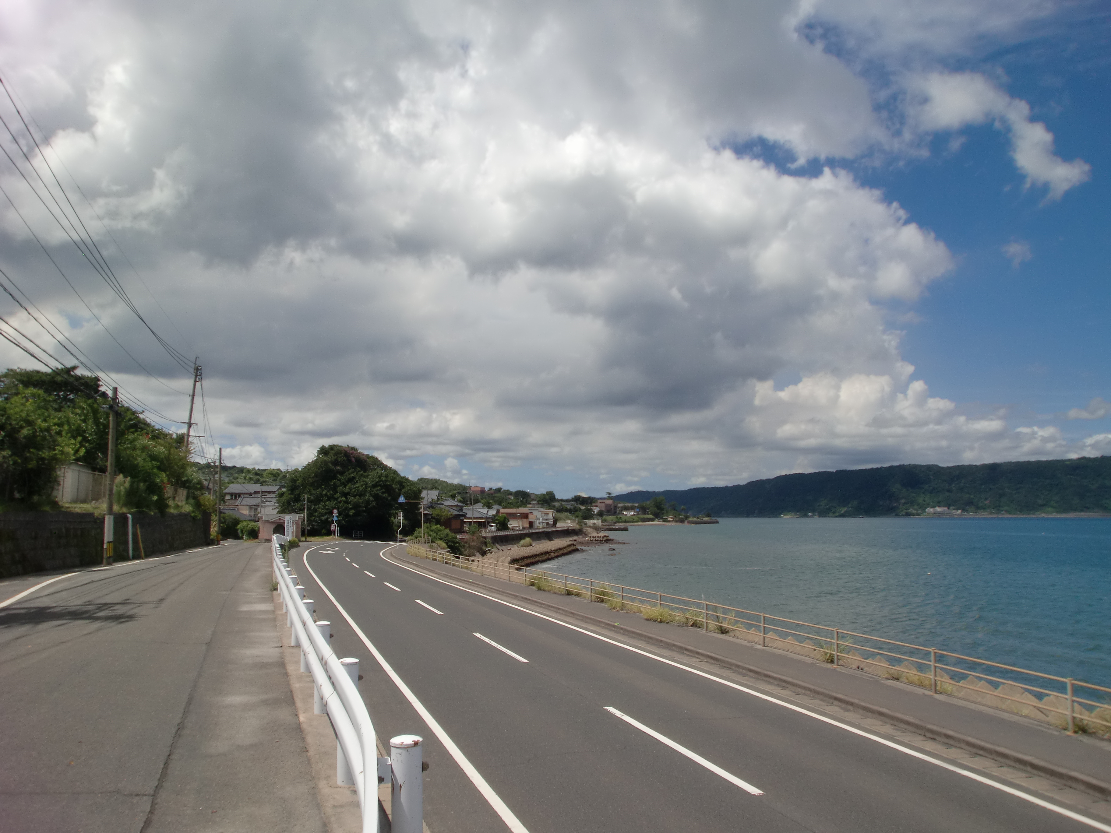 鹿児島県道26号桜島黒神線を桜峰小学校前から桜島港方面を望む。